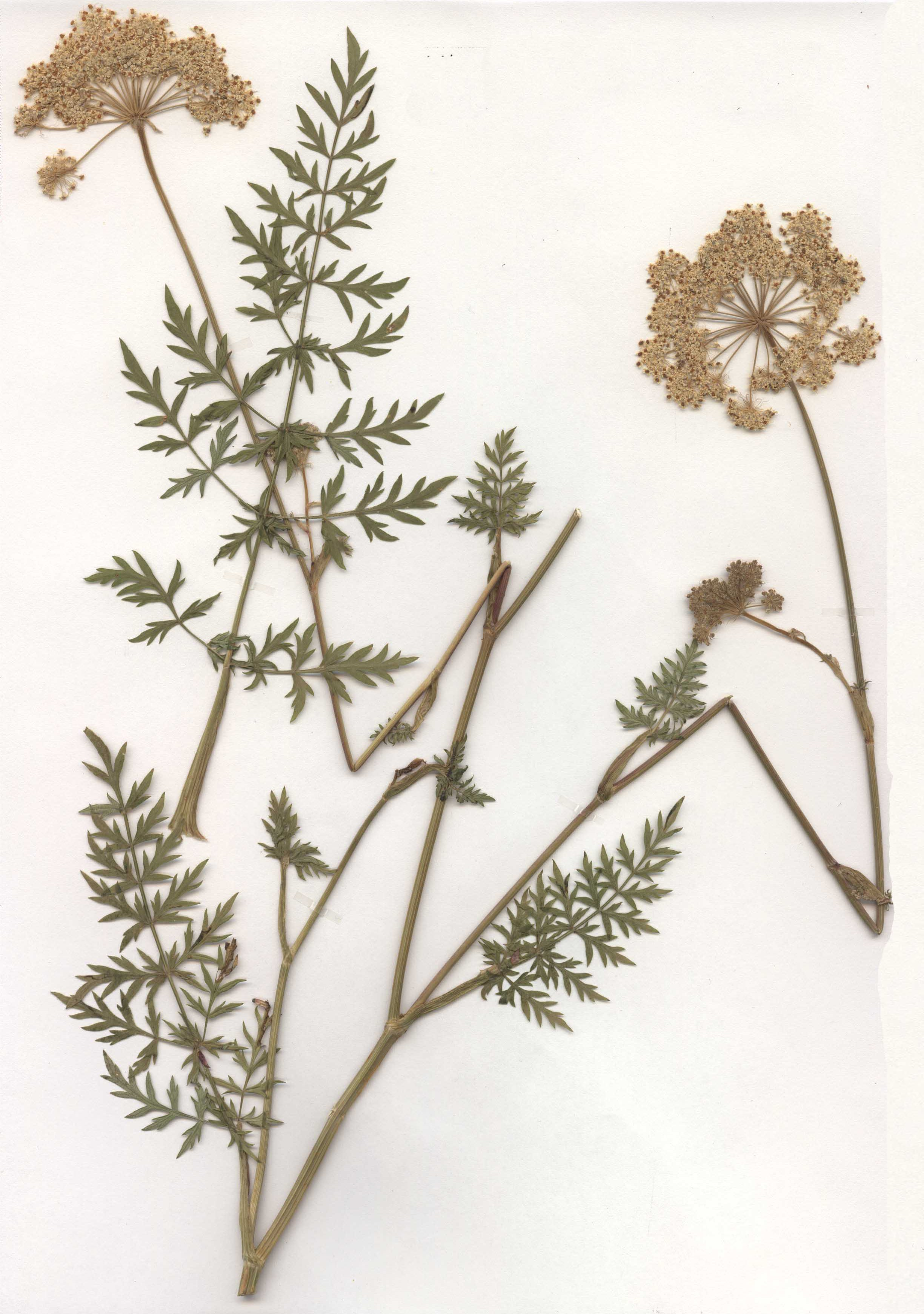 Seseli libanotis, eigener Herbarbeleg von 1987, Unterfranken